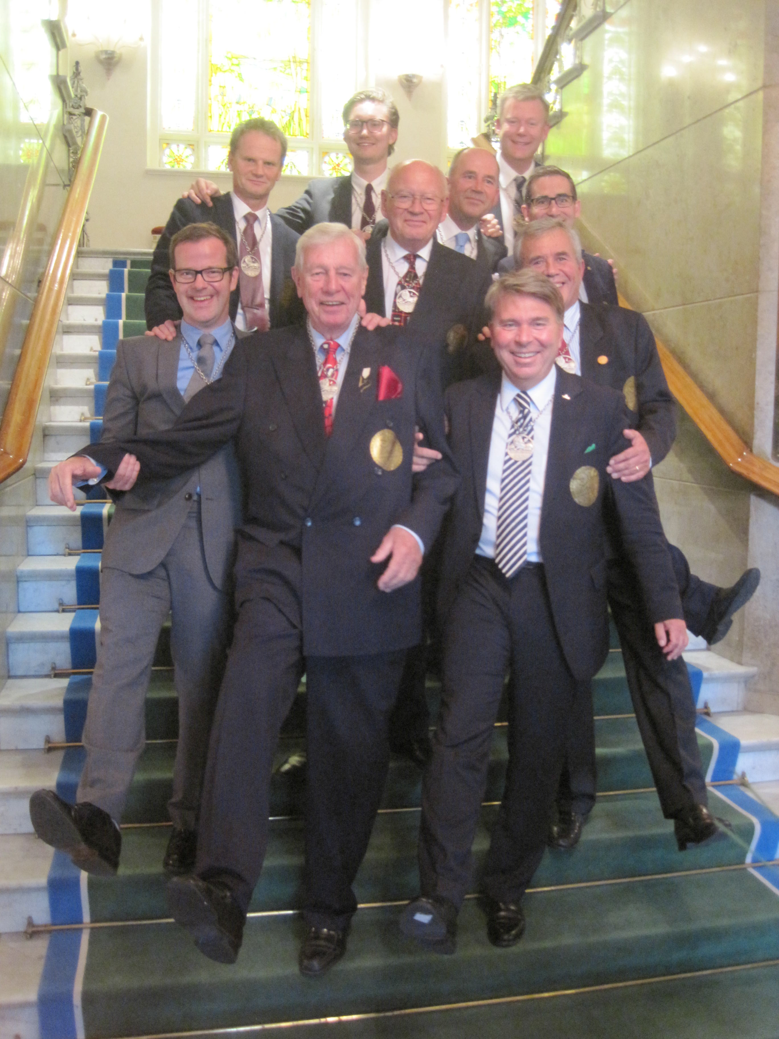 En grupp med merparten av karnevalsgeneralerna för Lundakarnevalen sedan 1962. Bakre raden från vänster: Claes Virdeborn (1990), Erik Neppelberg (2010), Sigge Barsby (1978), Pontus Bodelsson (1994) och Mats Nilsson (2002). Mellanraden från vänster: Christian Godden (1998), Kjell Stenström (1970) och Björn Barsby (1982). Främre raden: Eric Owers (1962) och Pehr Andersson (1986).